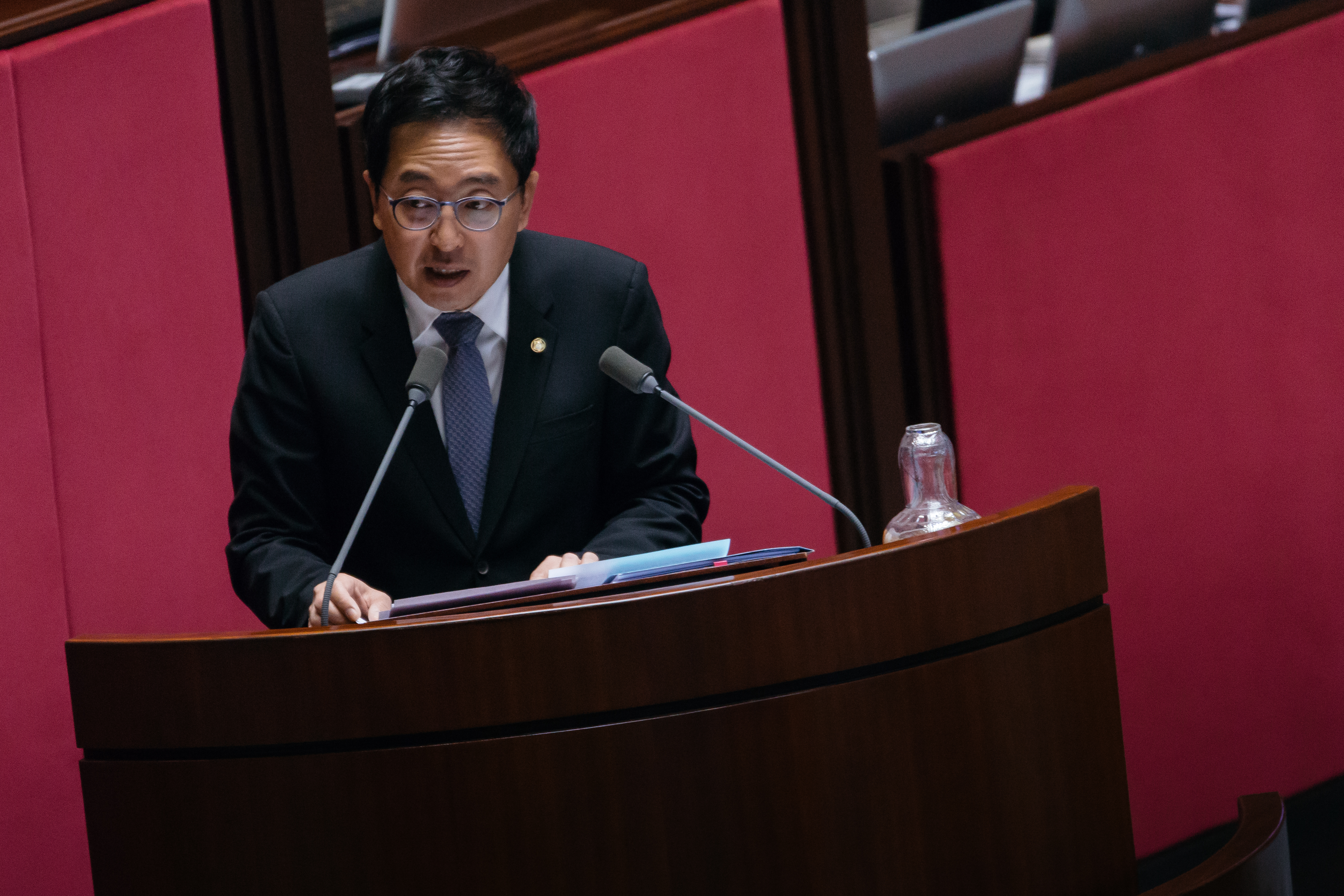 20180205 대정부질문